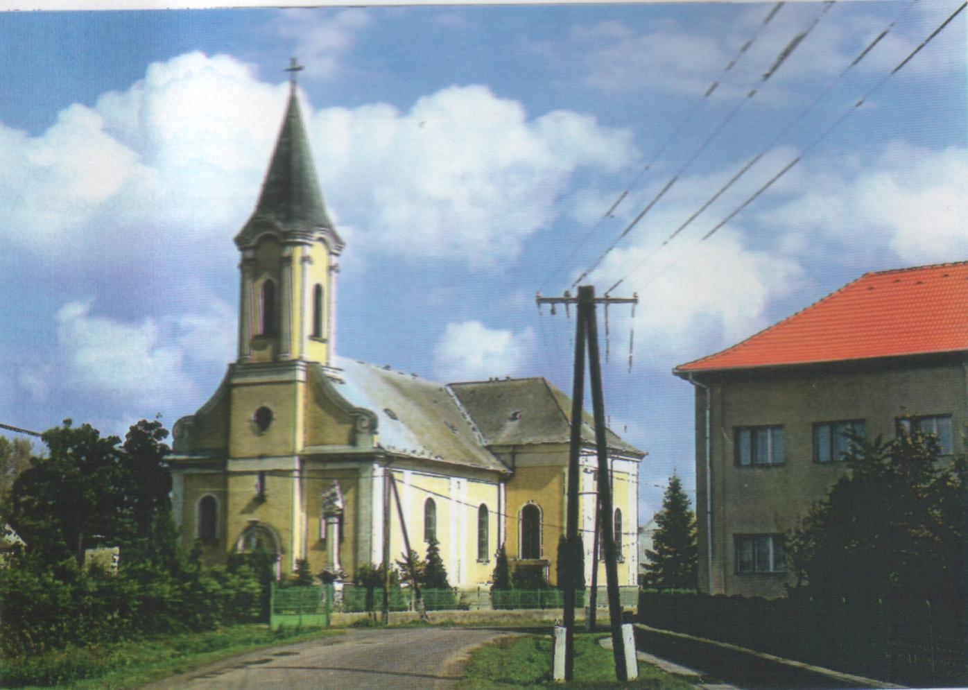 A közsépközpont. Az rk. templom és mellette az általános iskola (Rábapatona)